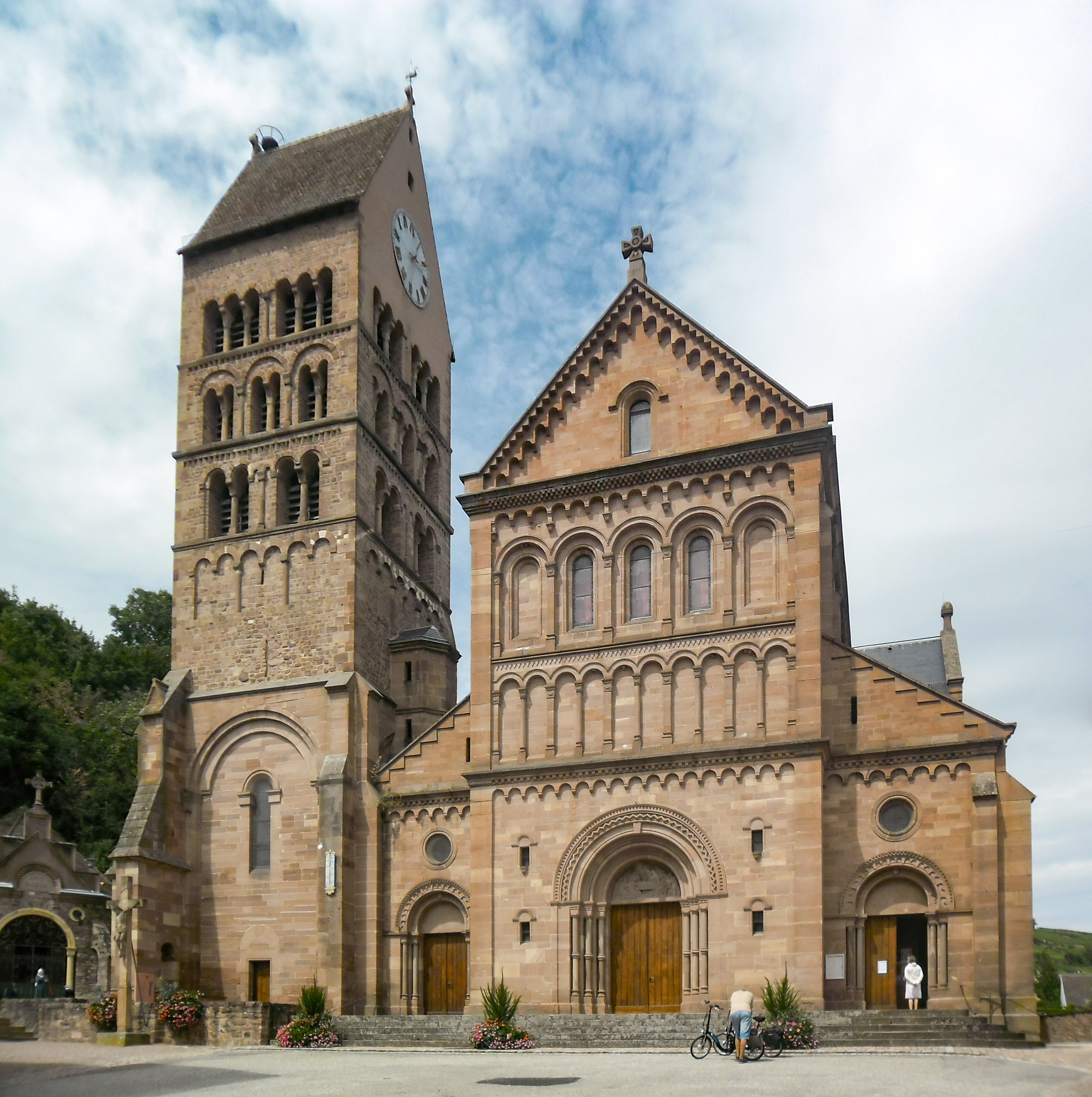 Église Saint-Pantaléon, Gueberschwihr